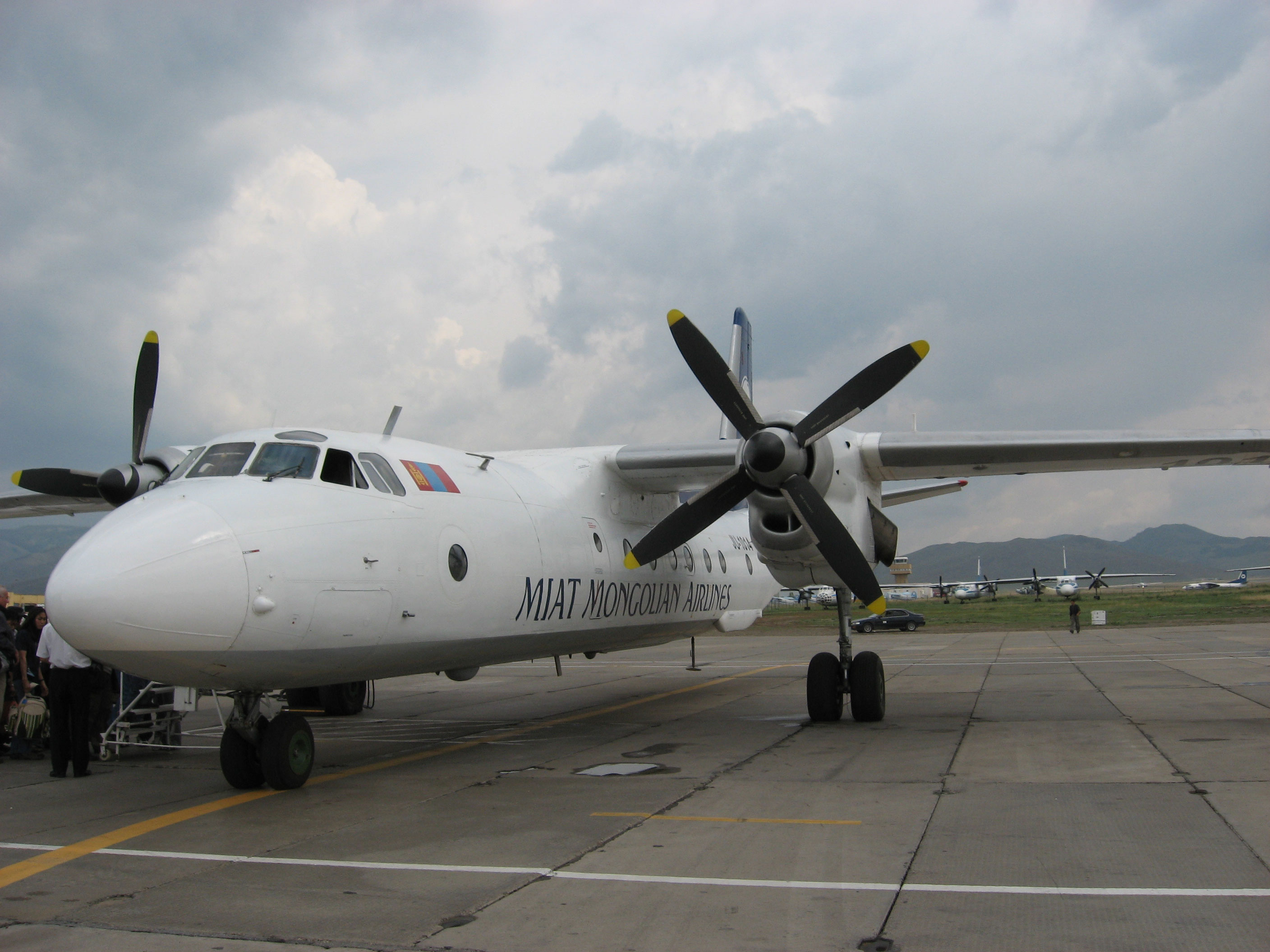 Miat plane (Antonov An-26B), on Chinggis Khaan airport, Ulaanbaatar, Mongolia